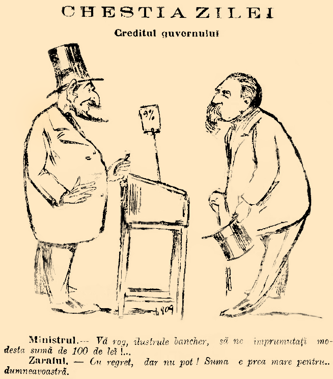 Caricatură apărută în ziarul Adevărul, 12, nr. 3695, 5 noiembrie 1899 satirizând lipsa bonităţii financiare a guvernului conservator